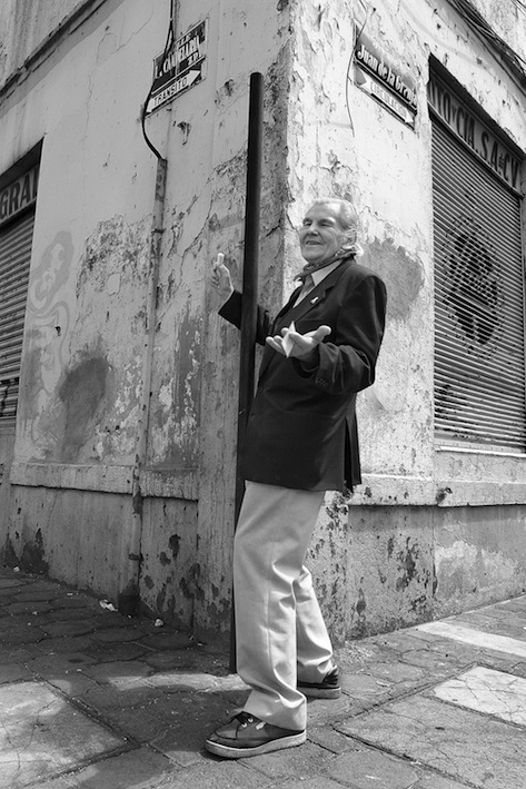 Héctor García en La Candelaria de los Patos